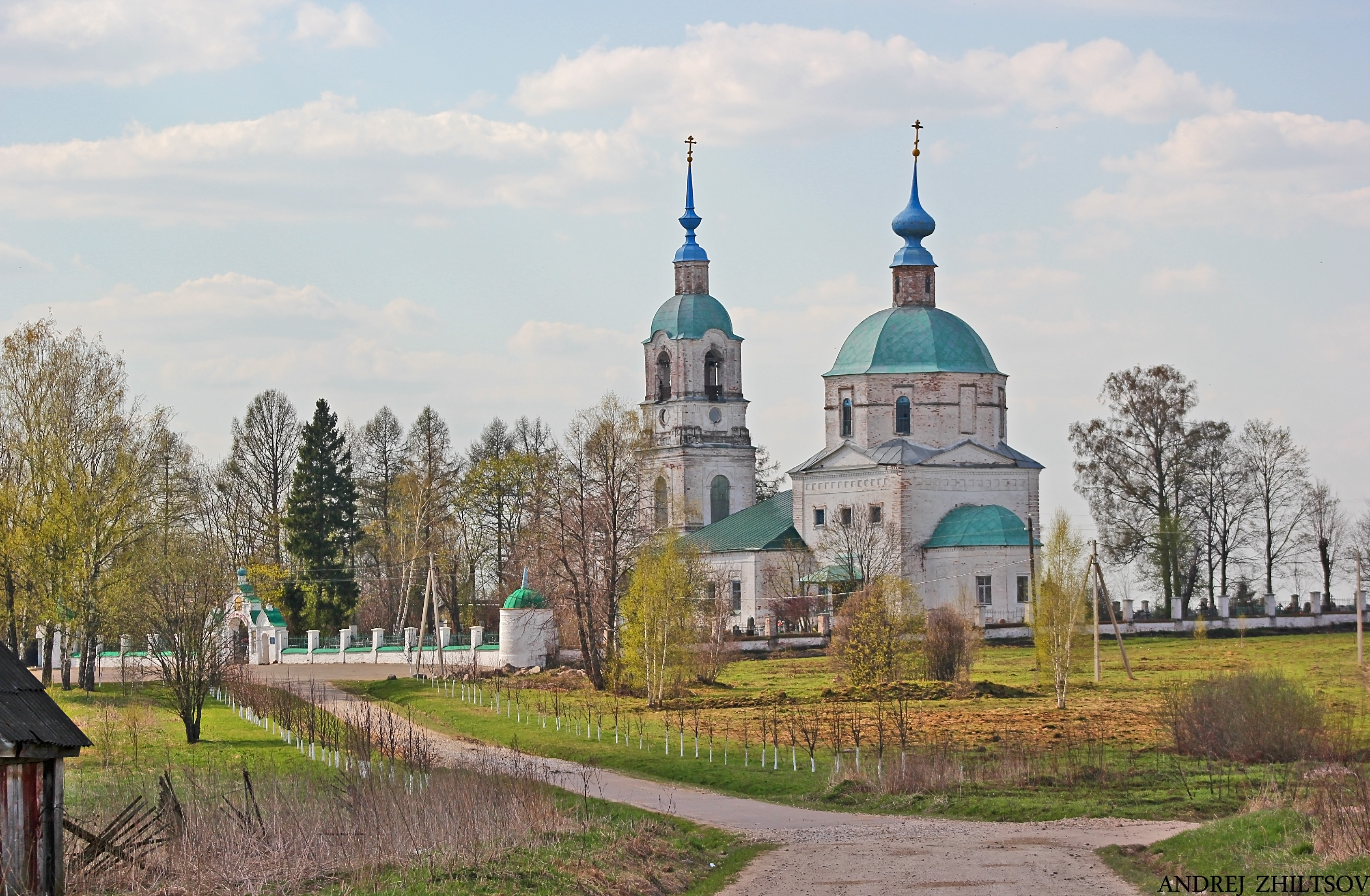 Церковь Введения Богородицы во Храм: Флорищи, Кольчугинский район, Владимирская область